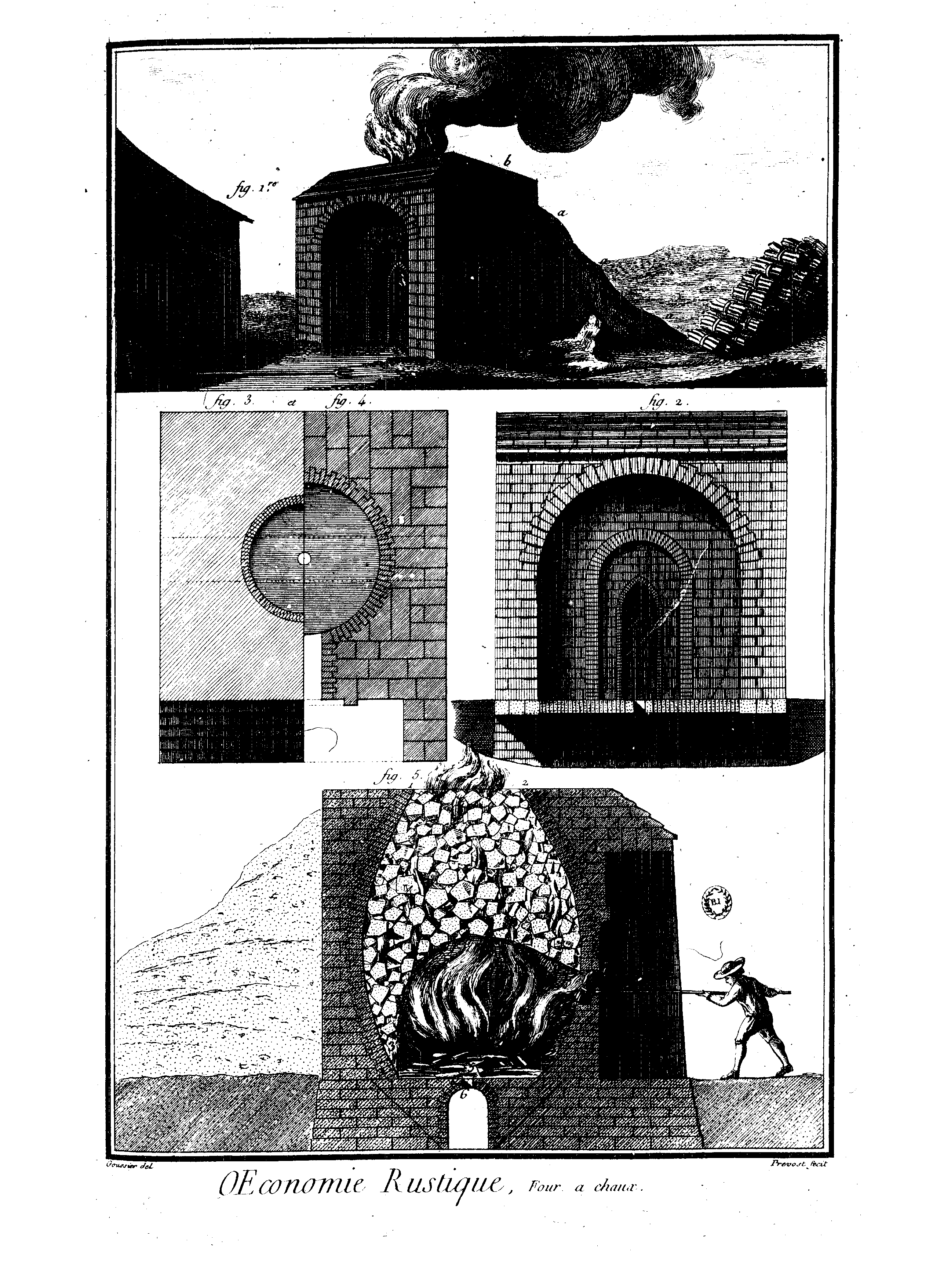 Planches de l'Encyclopédie de Diderot et d'Alembert, volume 1.